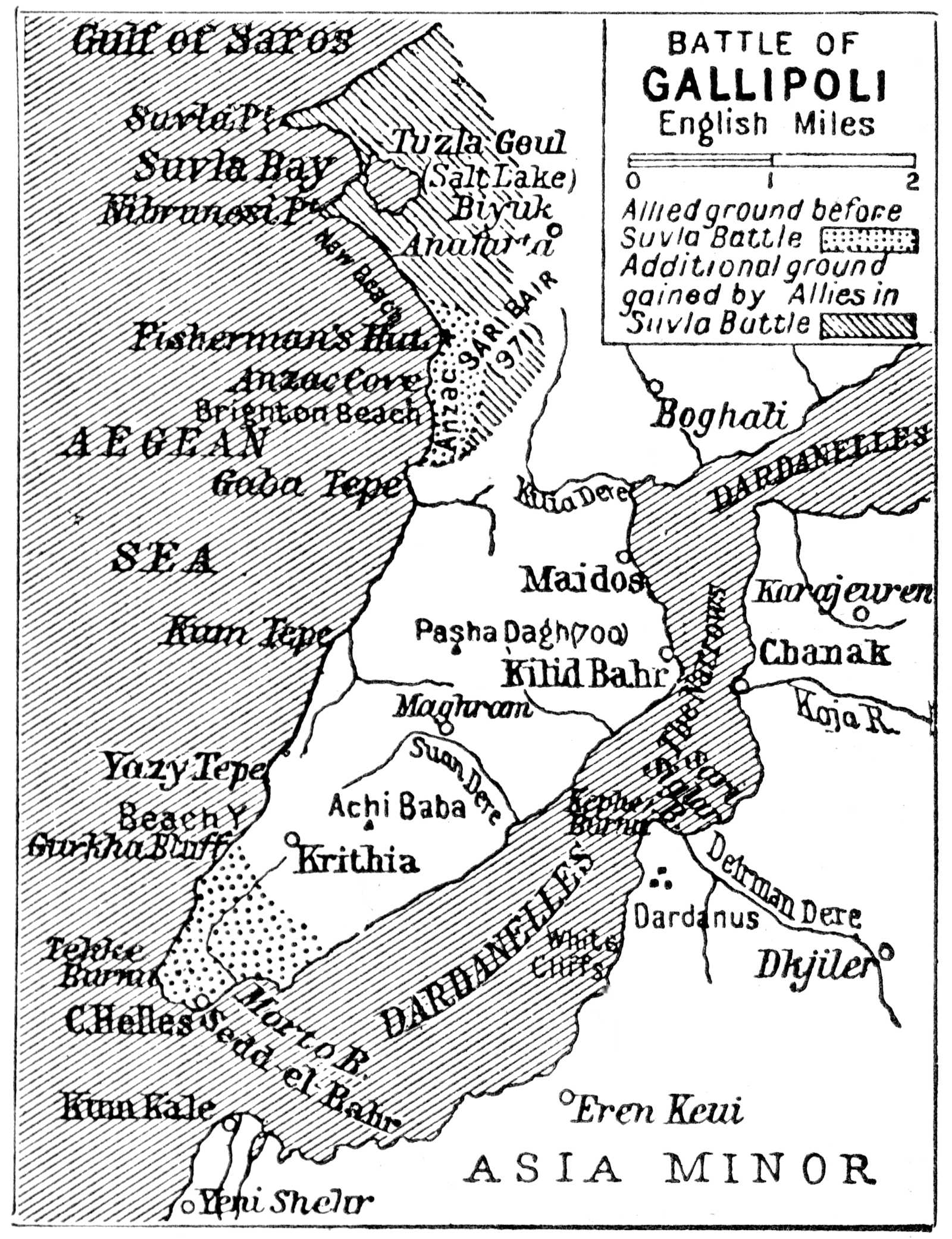 Carte anglaise de 1922 présentant les têtes de pont alliées à Gallipoli en 1915. En pointillés : les premières positions occupées après le débarquement du 25 avril 1915. Avec des rayures : l'élargissement de la tête de pont nord après le débarquement de la Suvla le 6 août 1915.